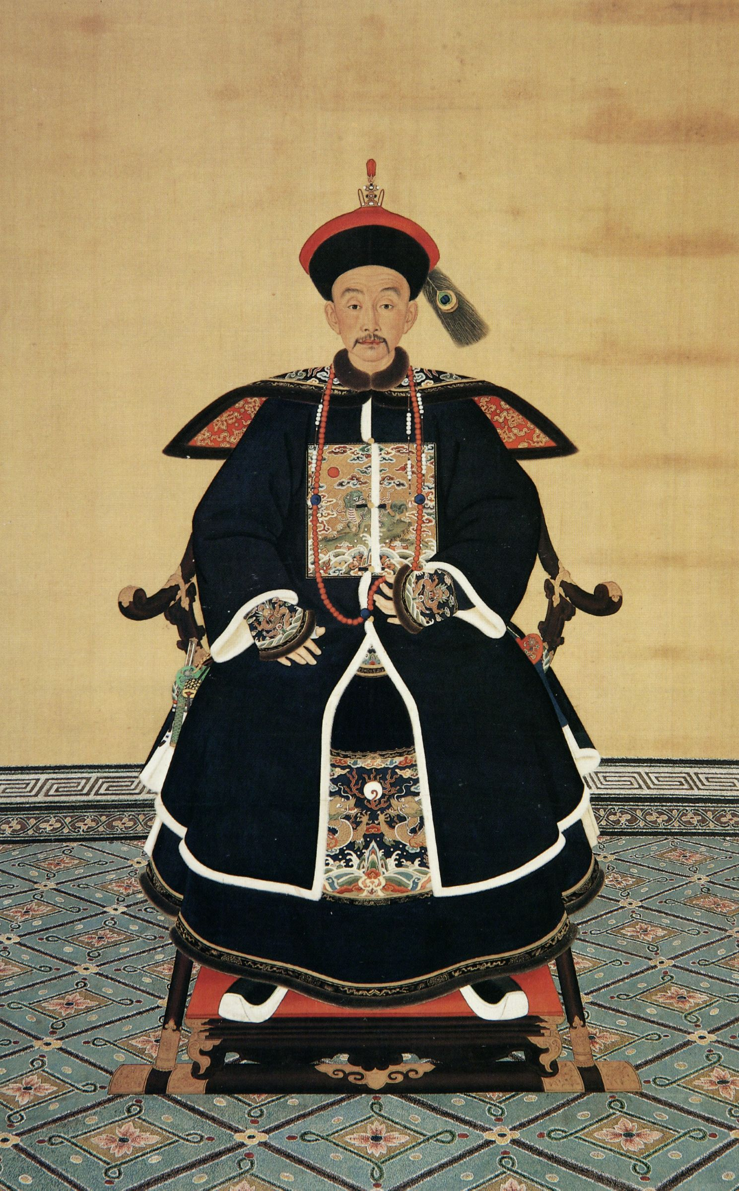 扎拉丰阿，寿禧和硕公主额驸